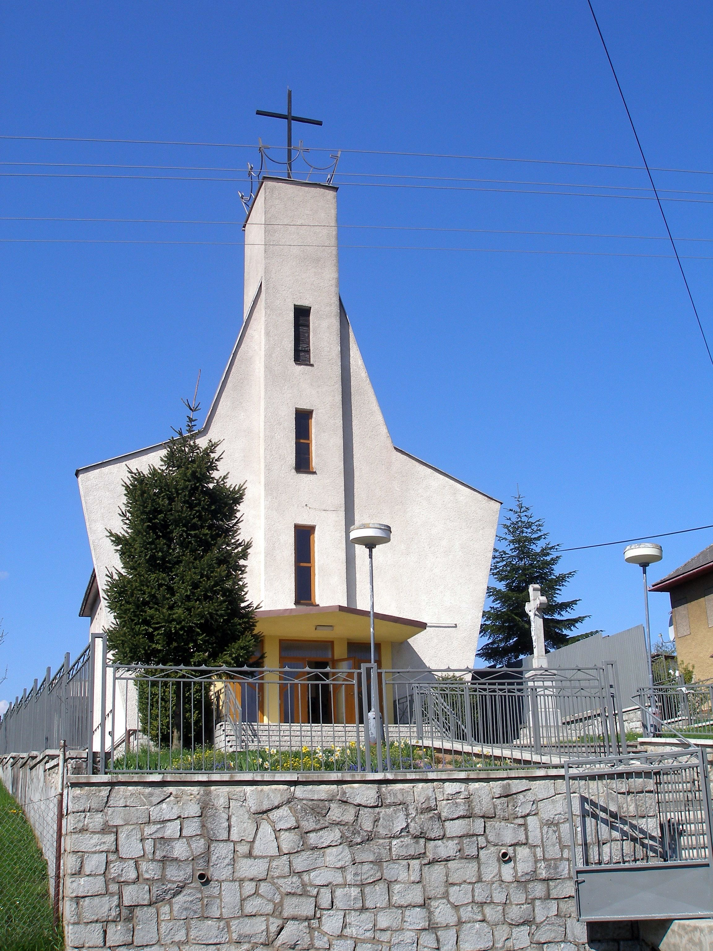 Obec Šarišská Trstená okres Prešov región Šariš